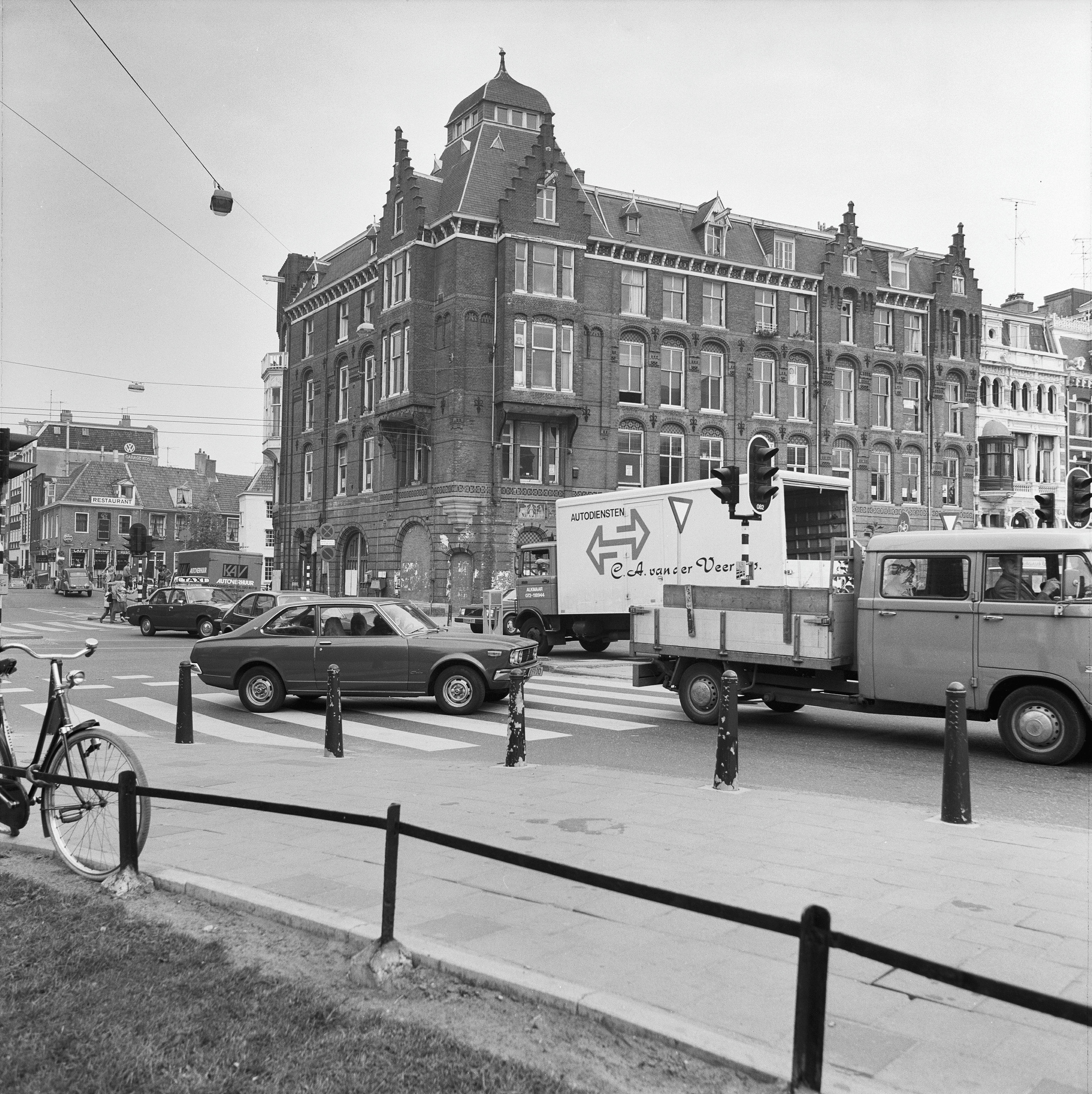 voorheen Melkinrichting